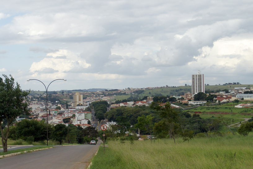 Imagem do município de Itapeva, estado de São Paulo, Brasil.